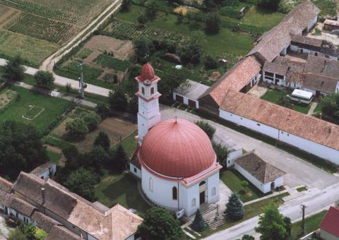 Palkonya, Hungary, aerialphotography